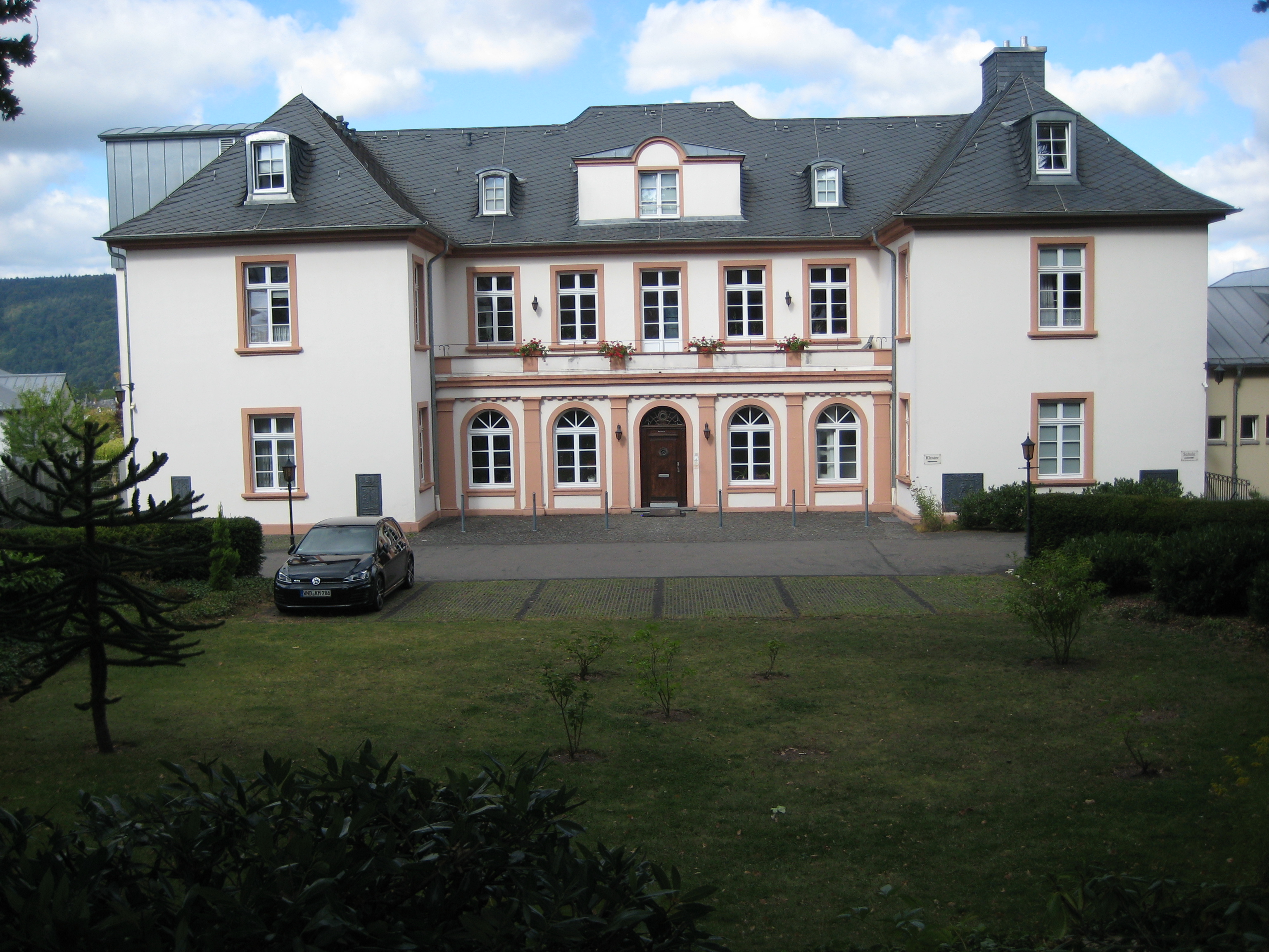 Margarethenhof mit dem heutigen Ursulinenkloster in Bernhardstraße 24/26